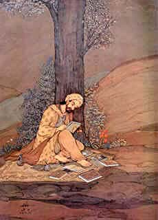 Миниатюра "Авиценна" Хуссейна Бехзада (1894-1968).